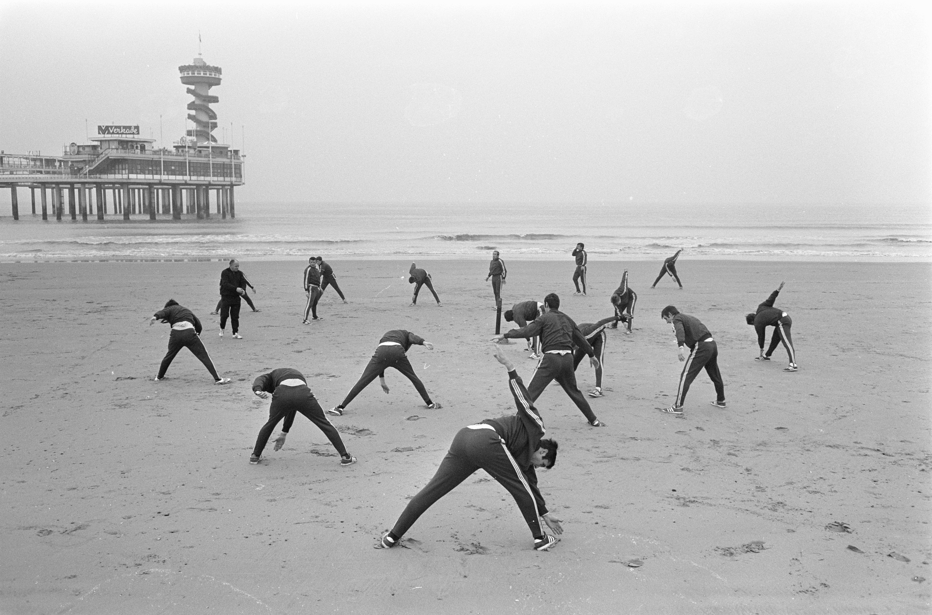 Collectie / Archief : Fotocollectie Anefo Reportage / Serie : [ onbekend ] Beschrijving : FC Koln traint op strand te Scheveningen, op achtergrond Pier FC Koln traint Datum : 11 november 1968 Locatie : Scheveningen, Zuid-Holland Trefwoorden : sport, stranden, trainingen, voetbal Fotograaf : Koch, Eric / Anefo Auteursrechthebbende : Nationaal Archief Materiaalsoort : Negatief (zwart/wit) Nummer archiefinventaris : bekijk toegang 2.24.01.05 Bestanddeelnummer : 921-8460